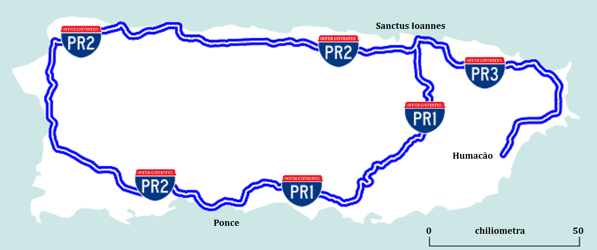 Autoviae Portudivitenses inter civitates